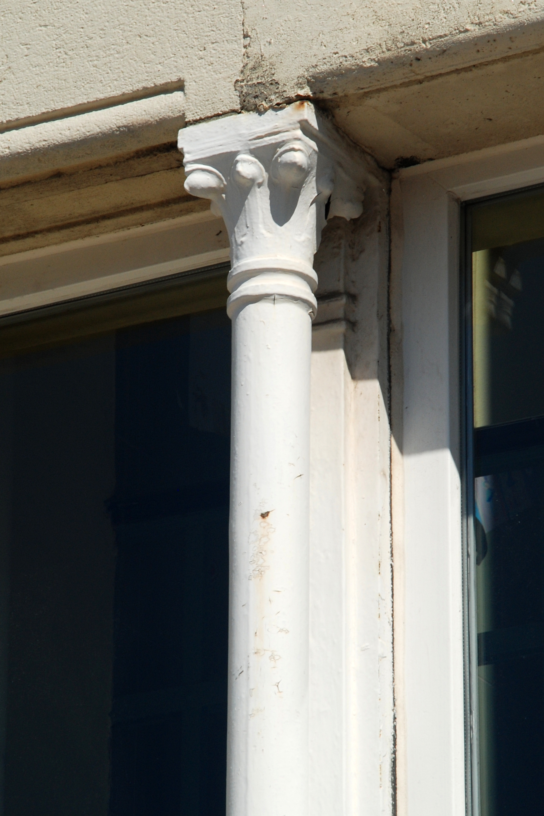 Belgique - Bruxelles - École Vervloesem